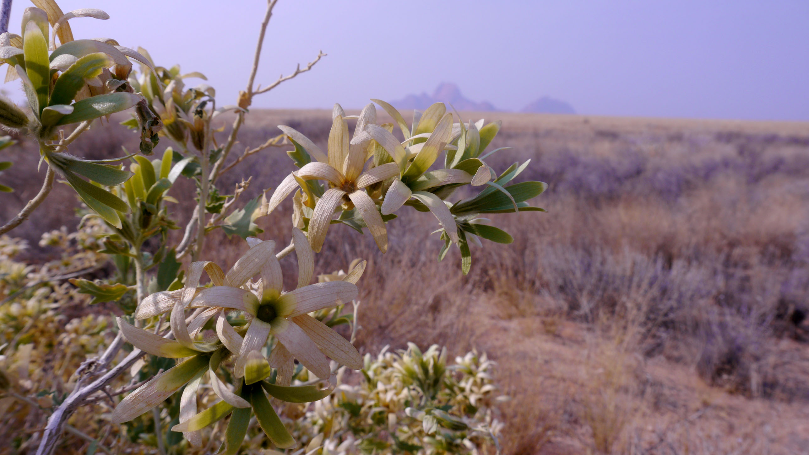 Kissenia capensis en Spitzkoppe (Namibia).